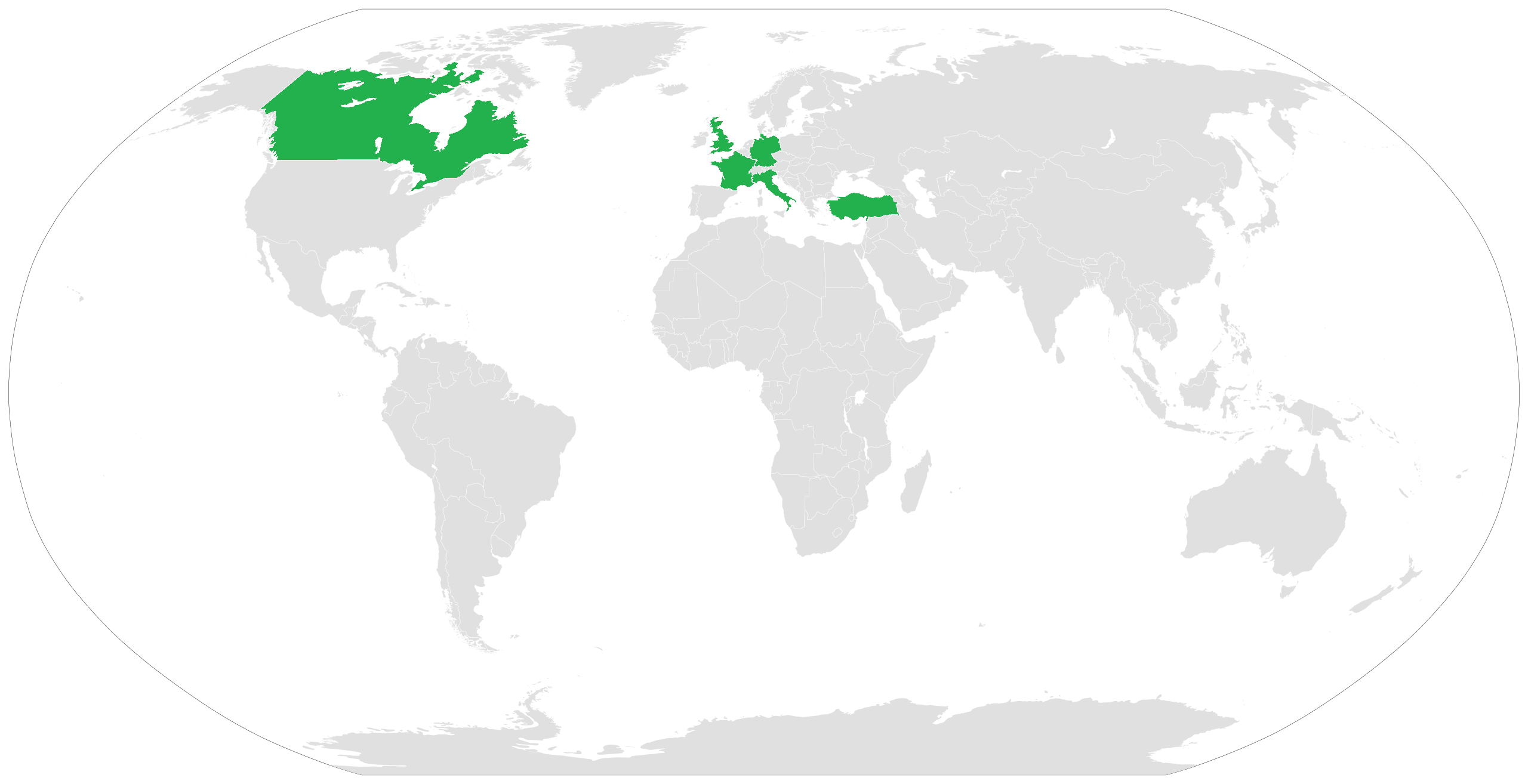 کشور های استفاده کننده از سی اِل-89 کاناد،ترکیه،انگلیس،فرانسه،ایتالیا،آلمان